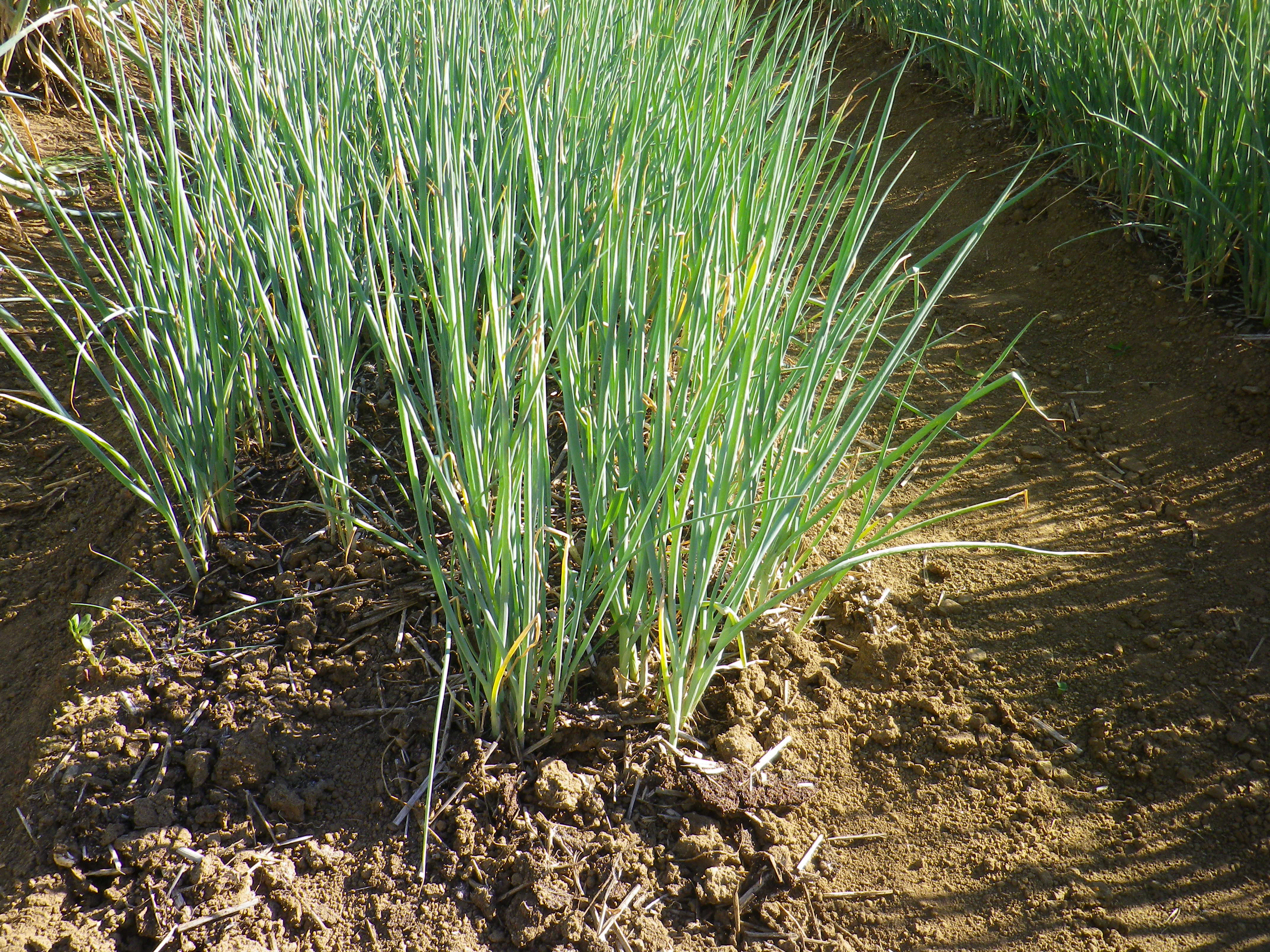 8月圃場での写真